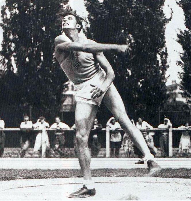 Ignace Heinrich, décathlonien (à la fin des années 1940).